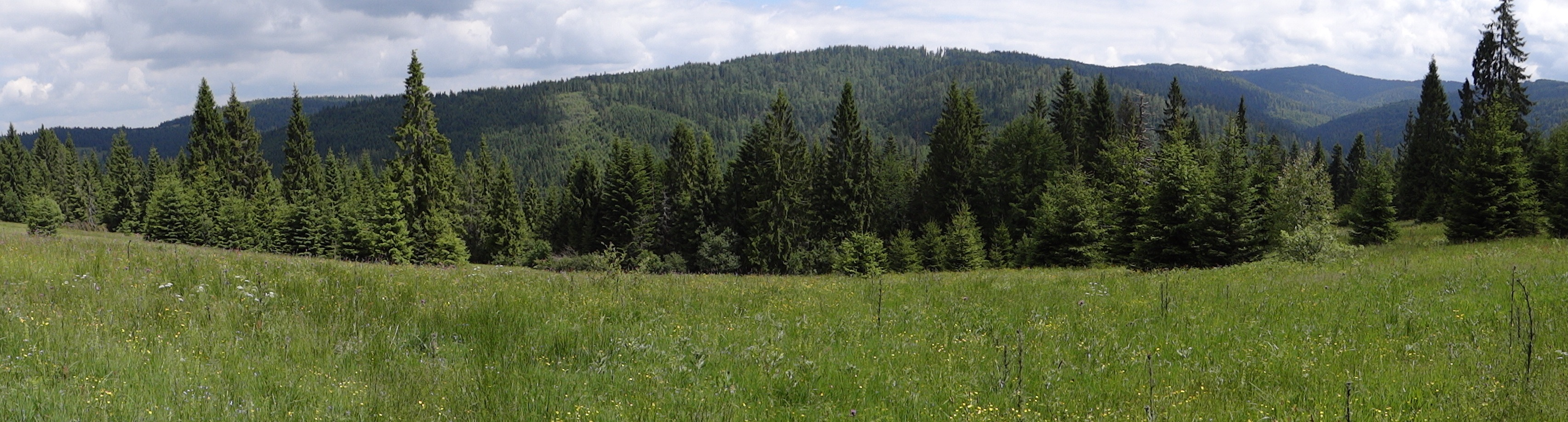 Panorama z Polany Roznowej w Gorcach